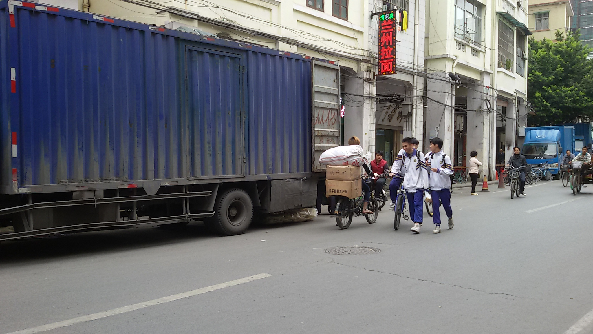 粵語: 長堤真光中學嘅校服